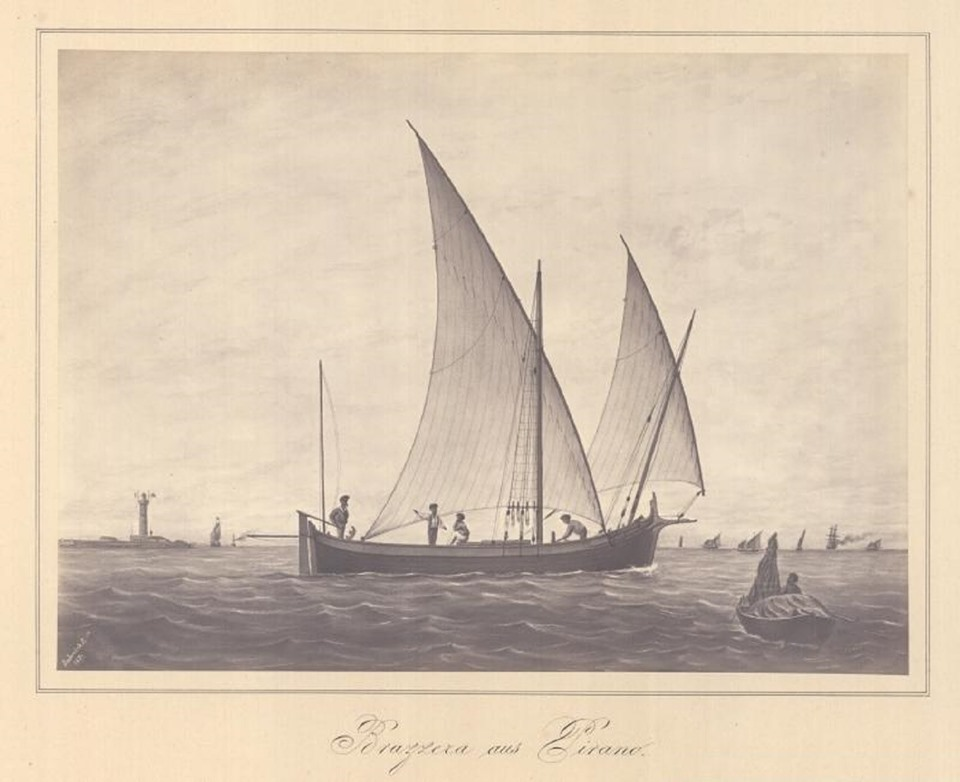 Piranska bracera Dabovich P.E. 1872